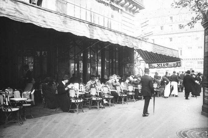 Café de la Paix, Paris, 1911.